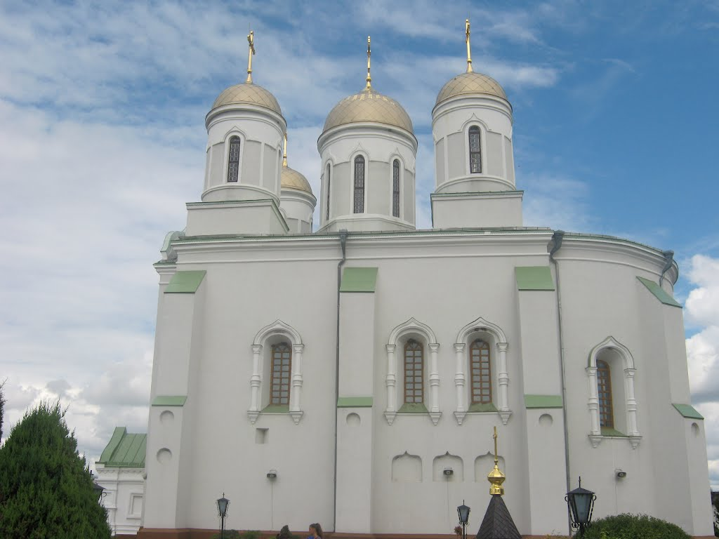 Успенська церква в Зимненському монастирі